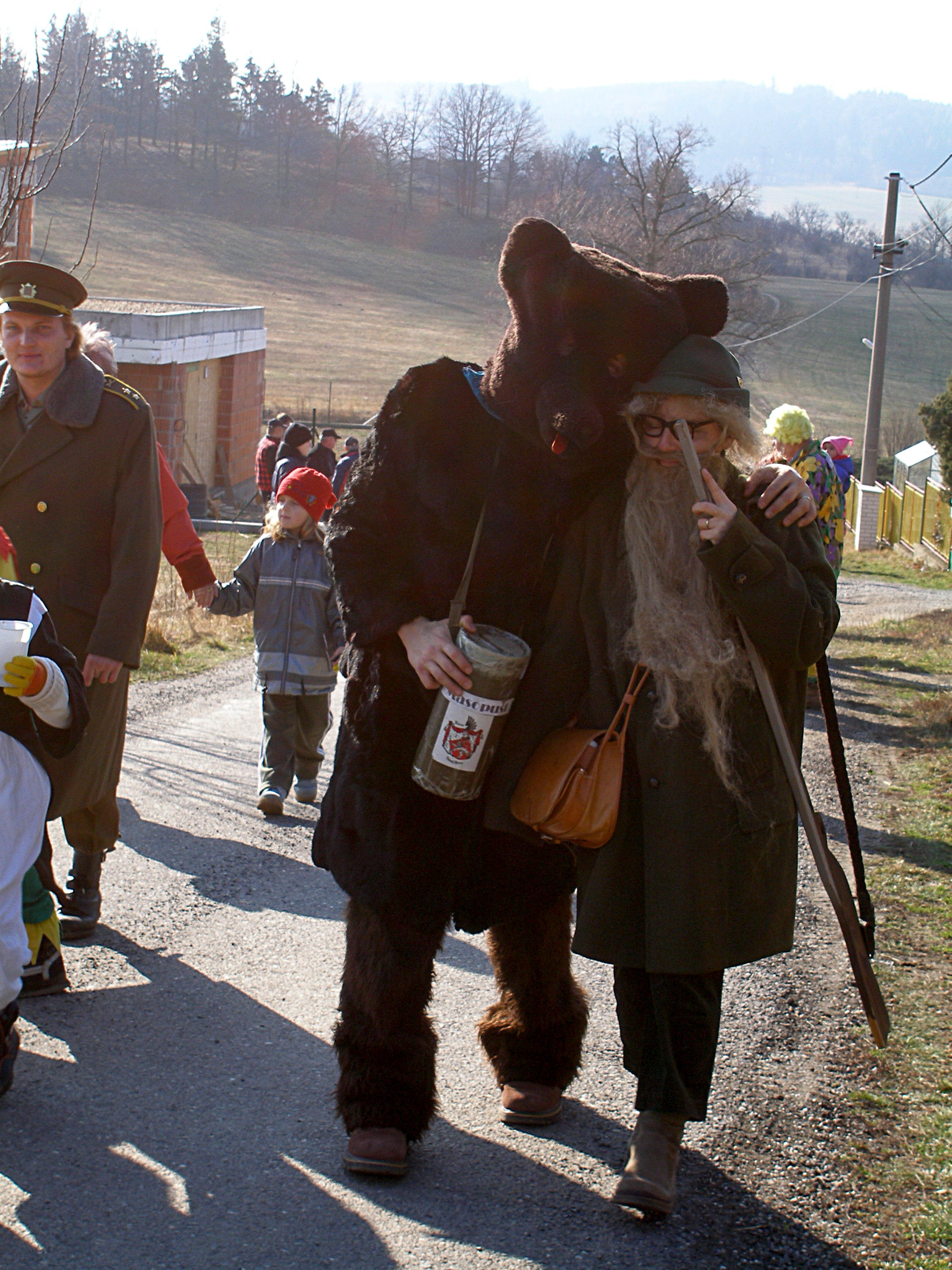 Masopustní průvod ve Vilové ulici v Novém Kníně